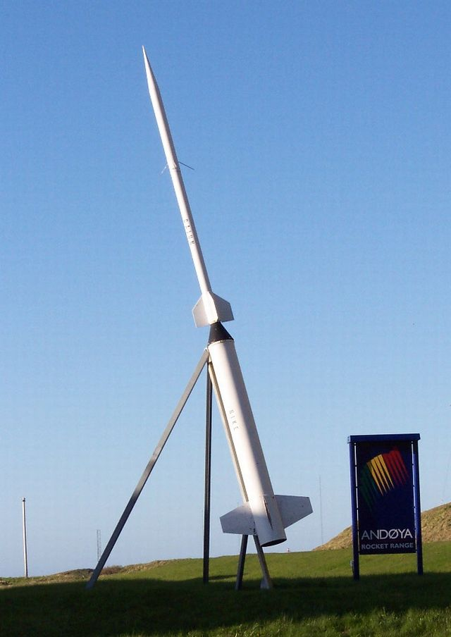 Replik einer Nike Cajun Höhenforschungsrakete im Eingangsbereich des Raketenstartplatzes Andøya, eigenes Bild, GFDL